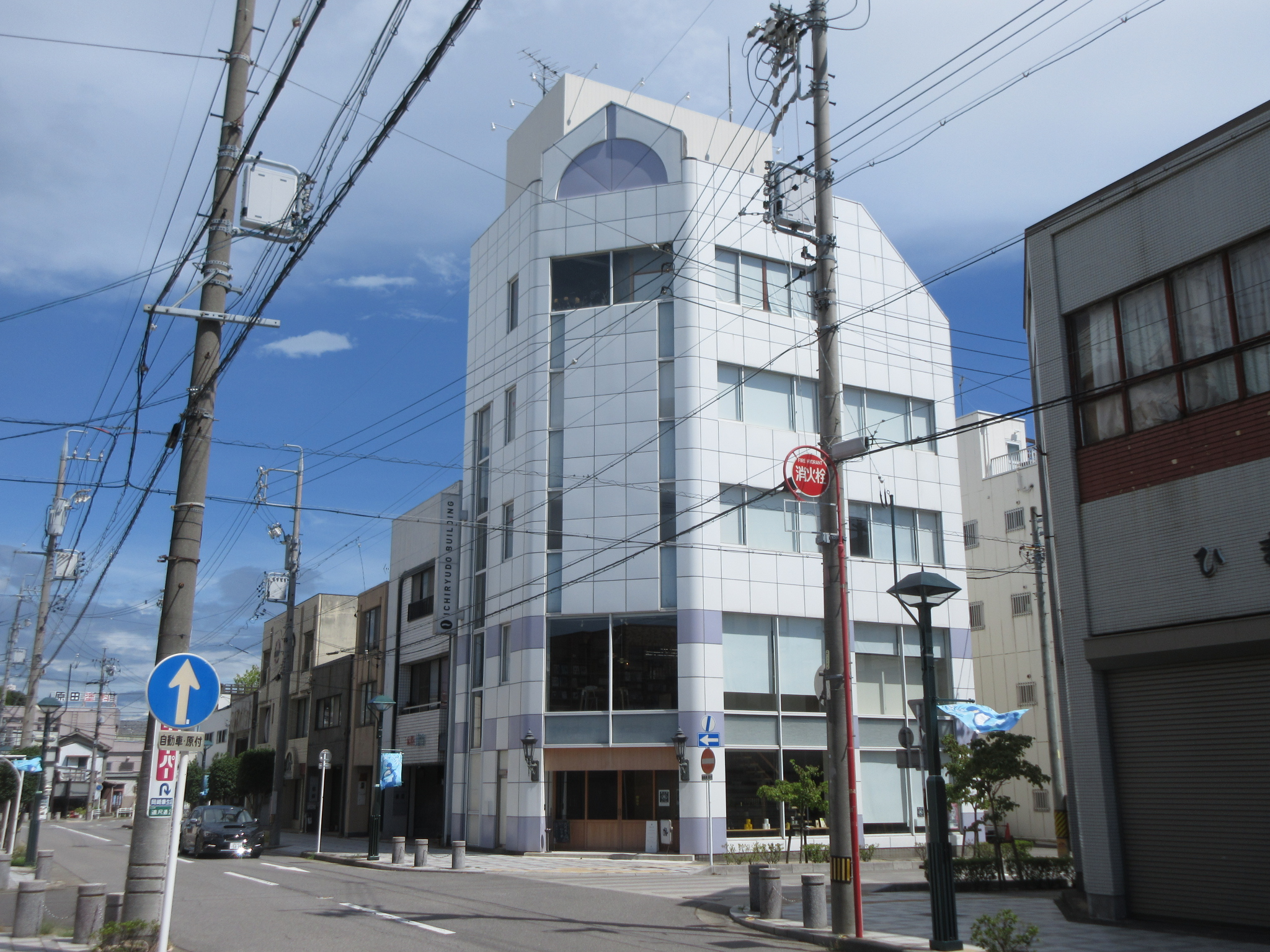 岡崎市連尺通。旧岡崎ガスのショールーム「ガスピアれんじゃく」。